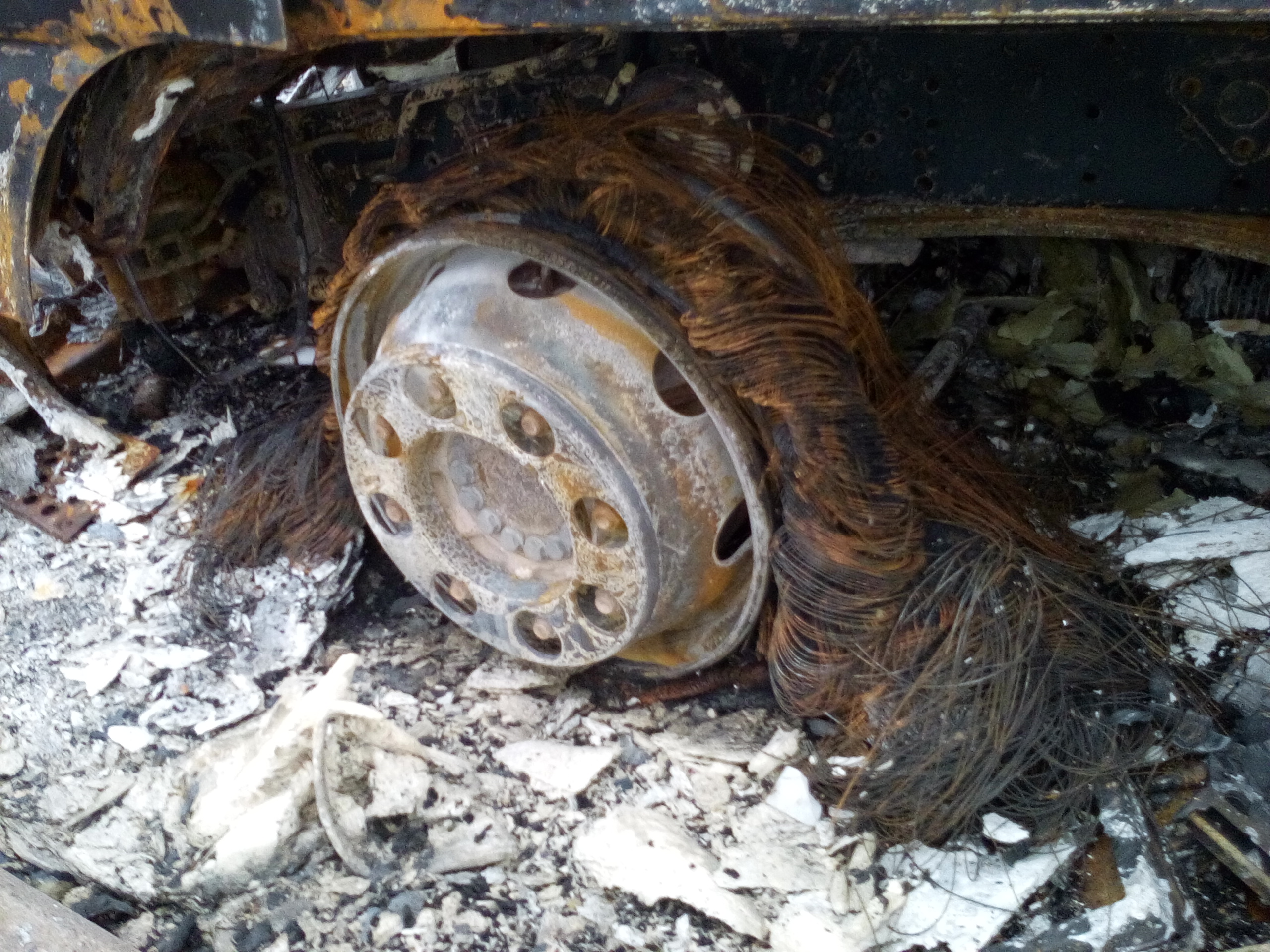 Causa incendio sono rimasti il cerchione e il metallo interno dello pneumatico